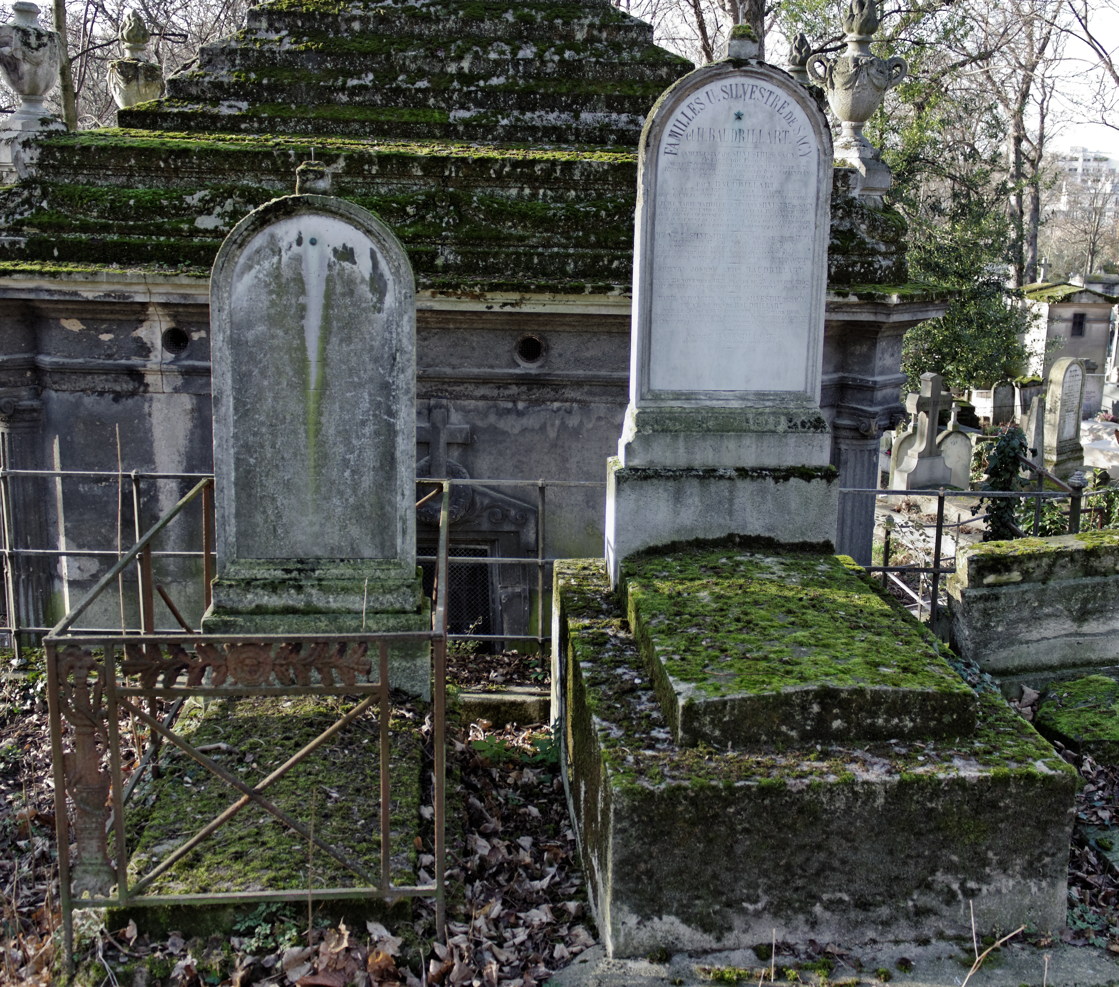 Vue d'ensemble